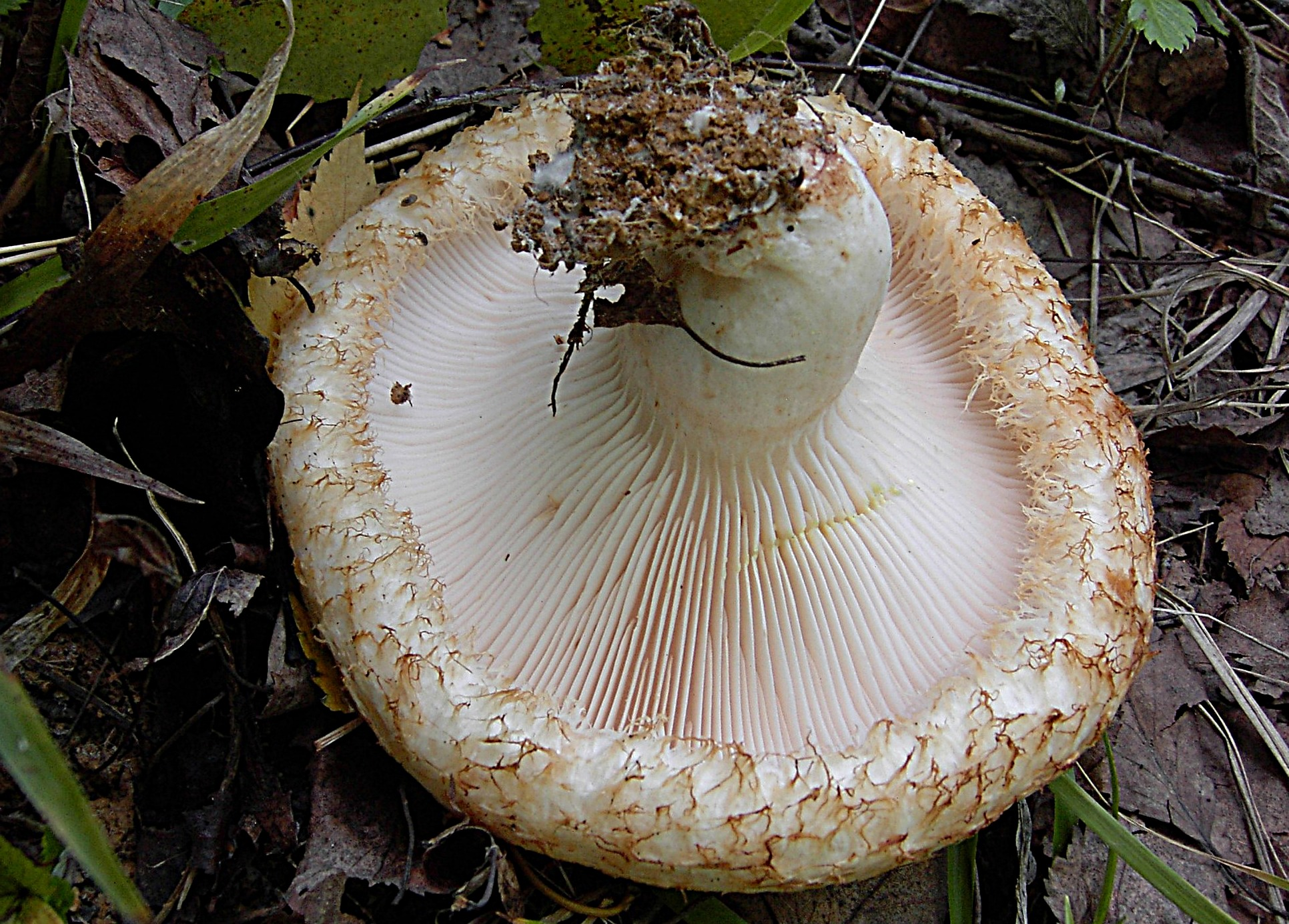 Lactarius citriolens Der Milchsaft an verletzten Lamellen verfärbt sich schwefelgelb. Fundort unter Birken und Zitterpappel mit eingestreuten Fichten auf tonig /lemigen Boden bei Selters/Niederselters / (Goldener Grund/Hintertaunus) etwa 300m NN.